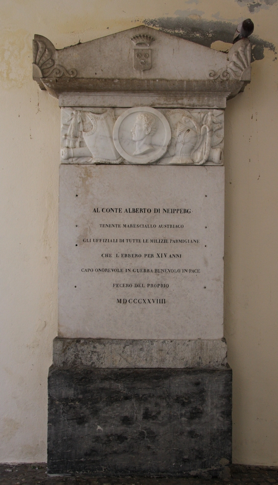 Plaque à la mémoire de Adam Albert von Neipperg se trouvant dans la cittadella de Parme